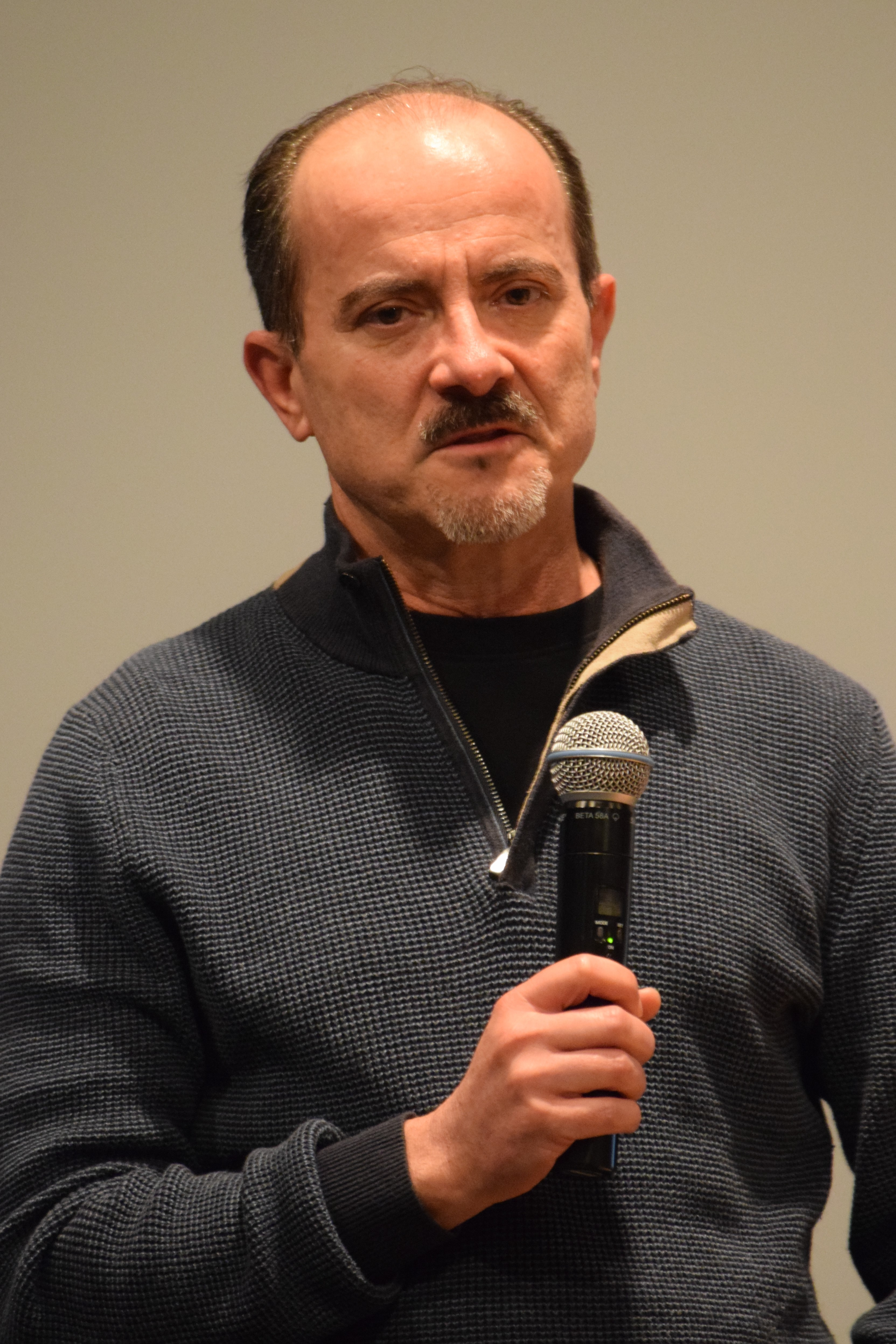 L'autor Daniel Torres durant l'entrega dels premis de la AACE (Asociación de Autores de Cómic de España). Torres va rebre el premi en reconeixement a toda una carrera profesional en el cómic. 37 Còmic Barcelona.